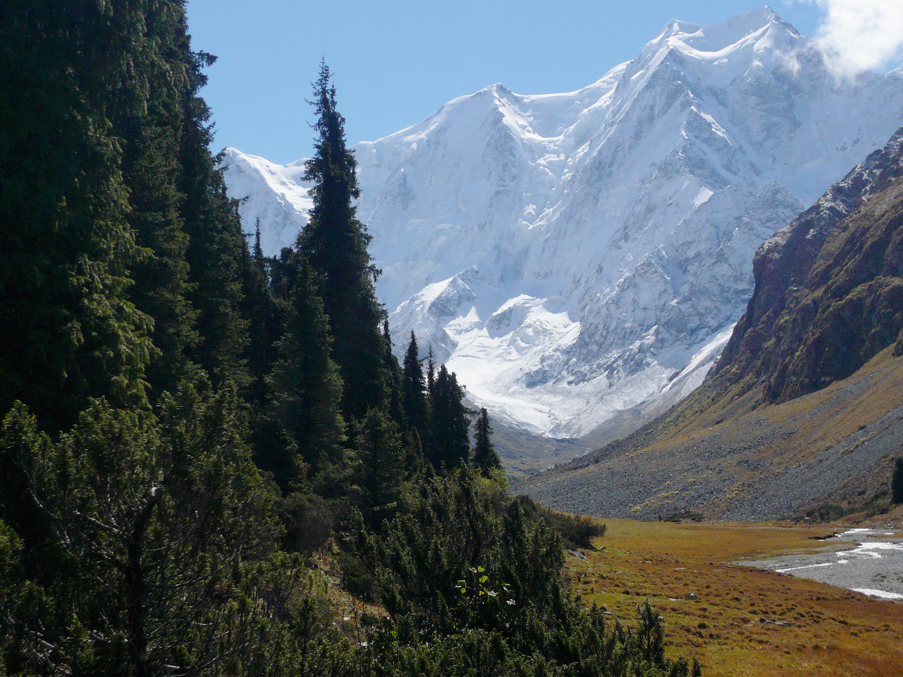 "Ochsenkopf" im Tian Shan (Kyrgyzstan)